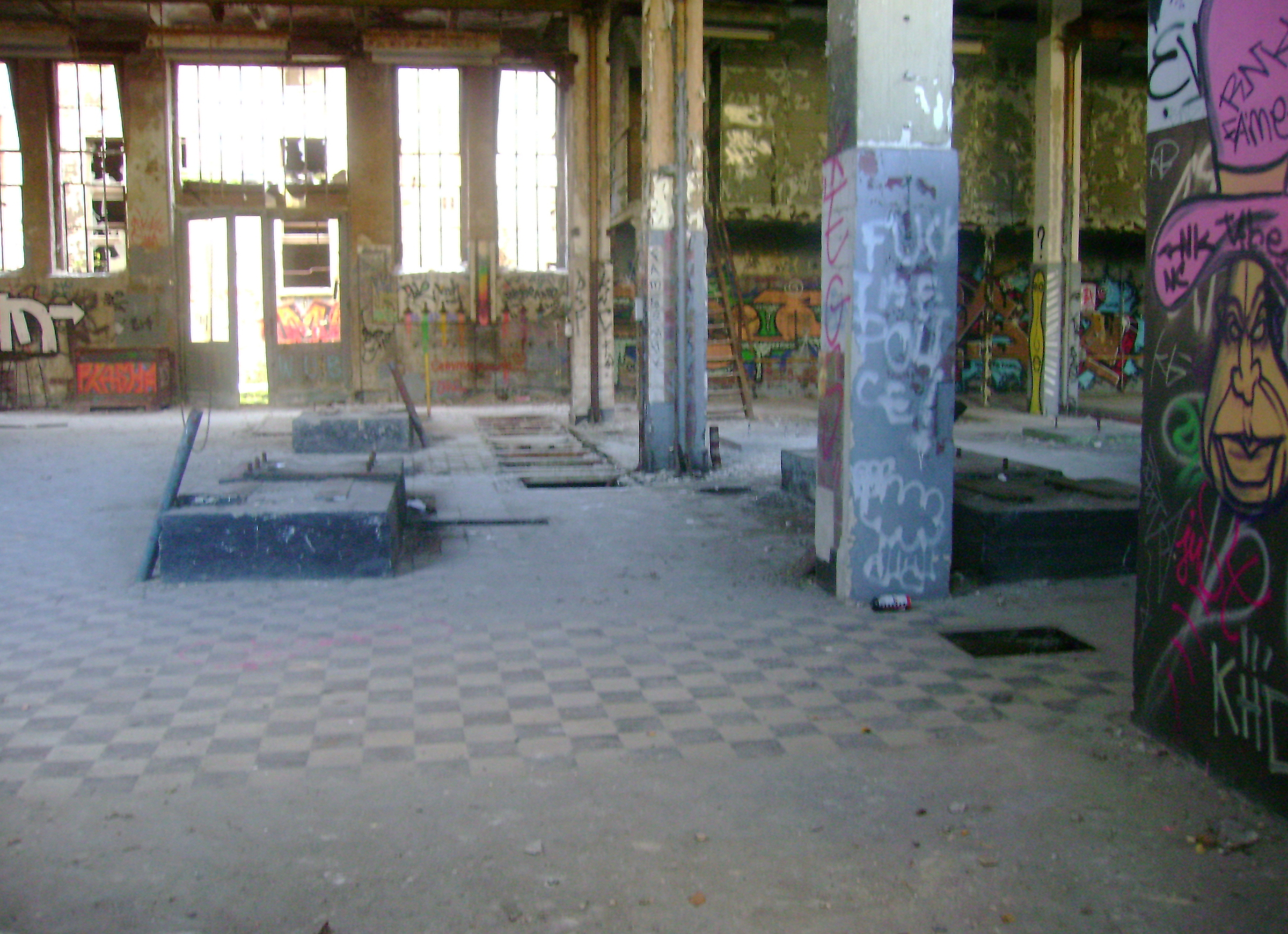 Eisfabrik Berlin, Köpenicker Strasse